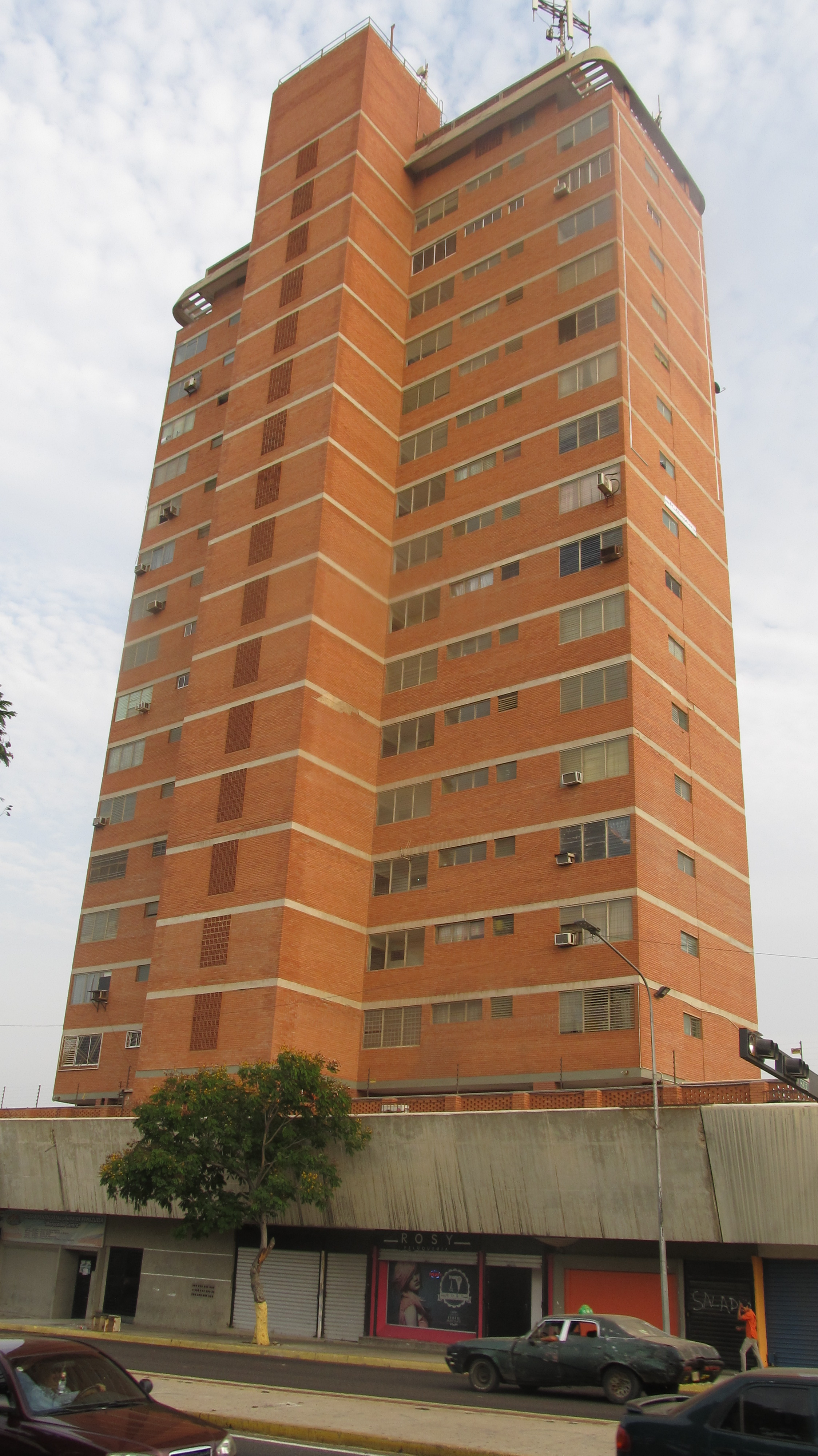 Torres Residencial del Edificio Padillo, ubicada en la población de Maracaibo, estado Zulia, Venezuela